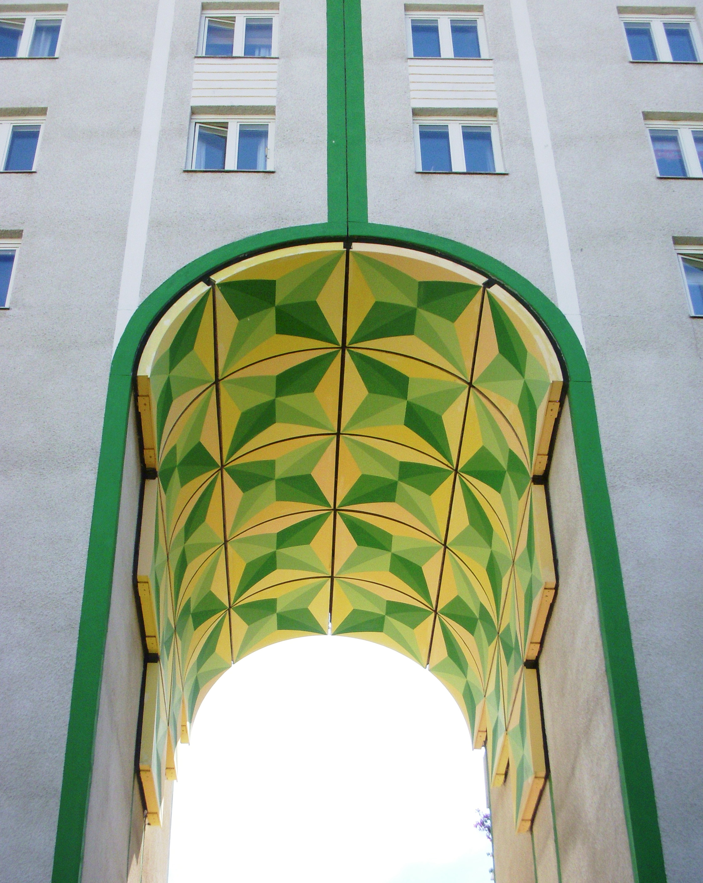 Bostadshuset "Brinckan 3" på Södra stationsområdet (portal)